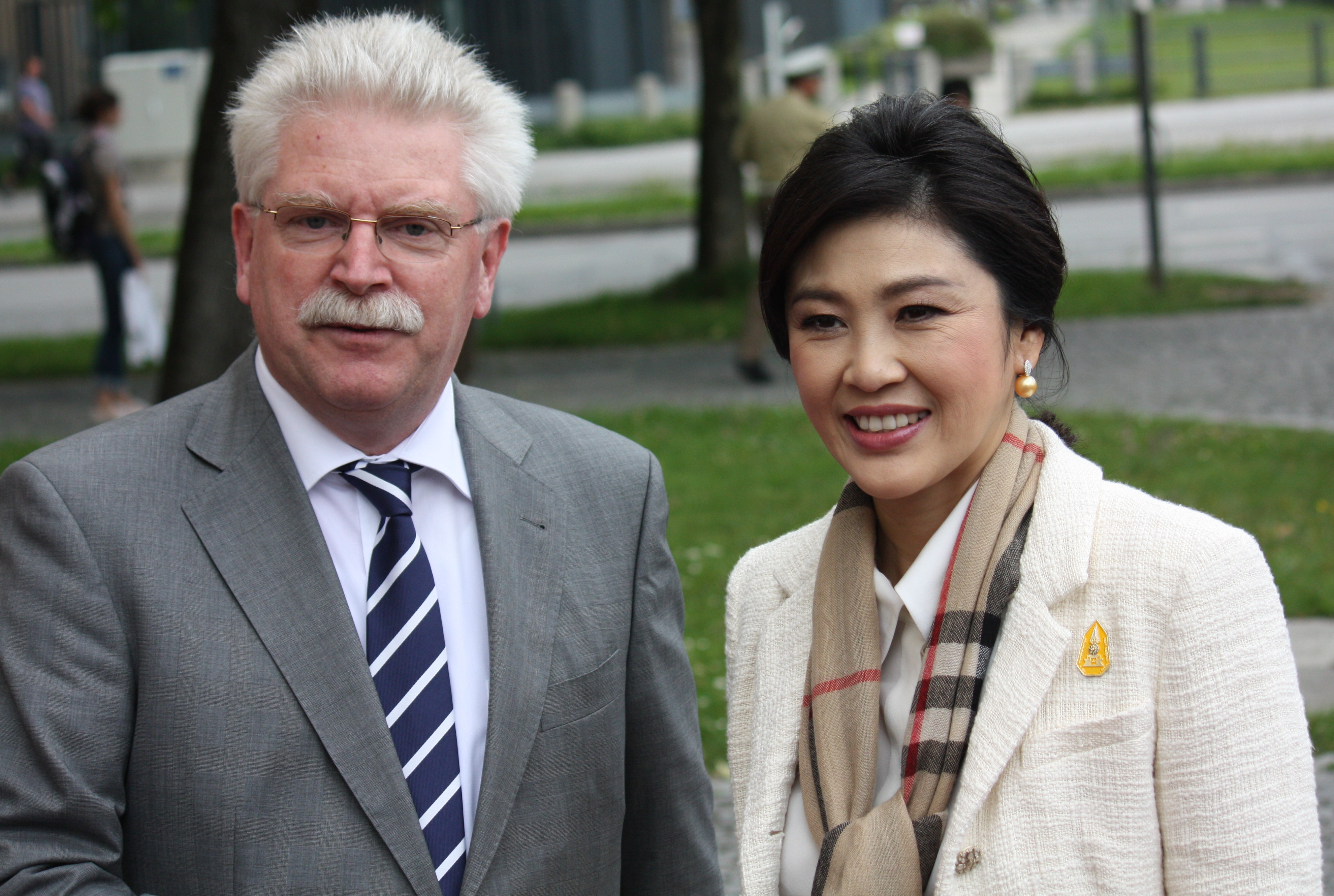 Der bayerische Wirtschaftsminister Martin Zeil und die thailändische Premierministerin Yingluck Shinawatra in München